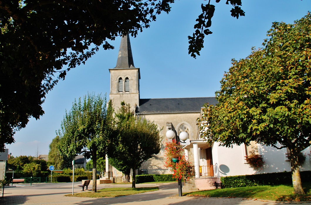 église Ste Catherine